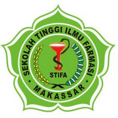 Sekolah Tinggi Ilmu Farmasi Makassar